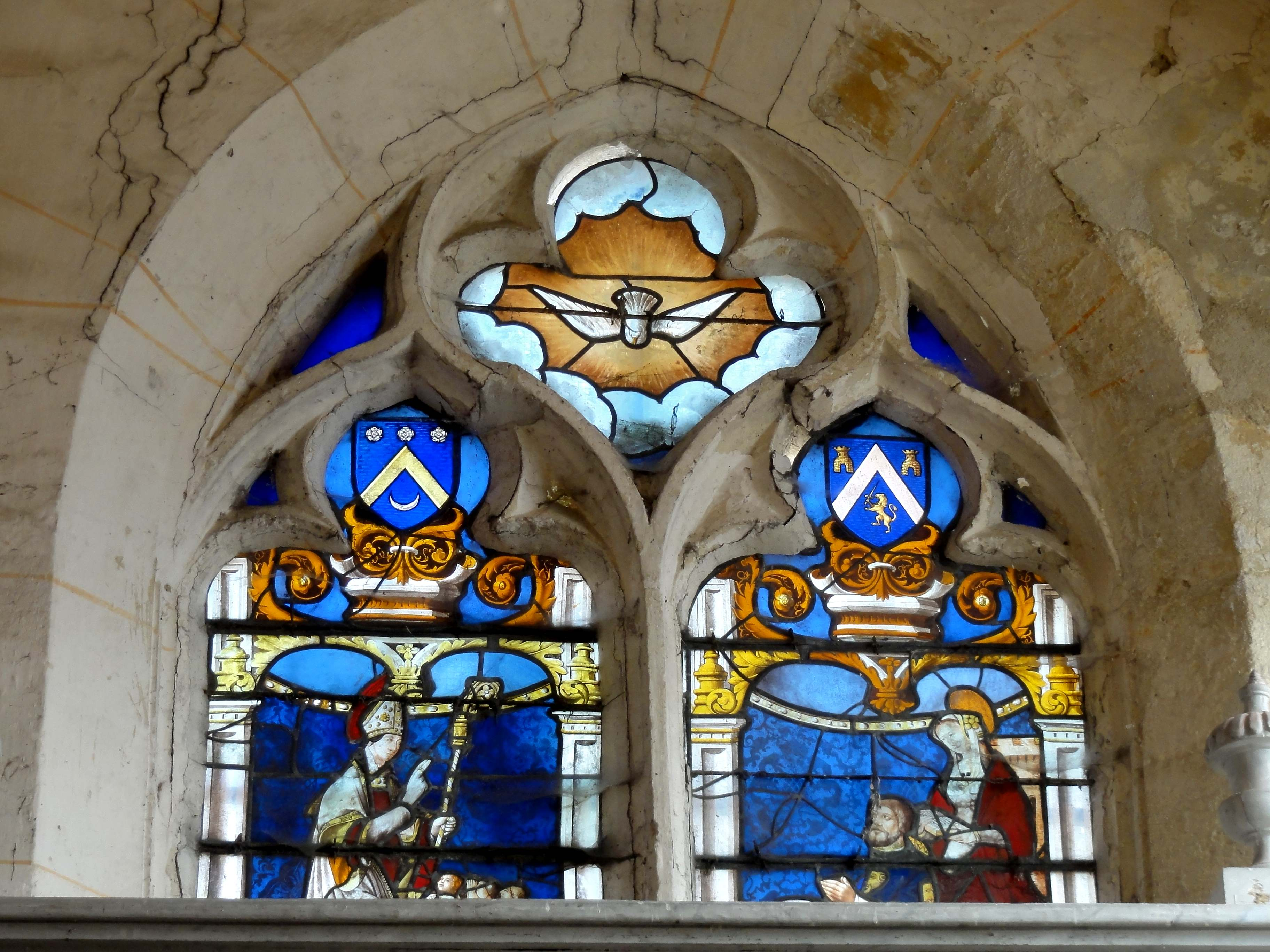 Verrière n° 2 - saint Nicolas, sainte Madeleine présentant des donateurs ; second quart XVIe siècle.